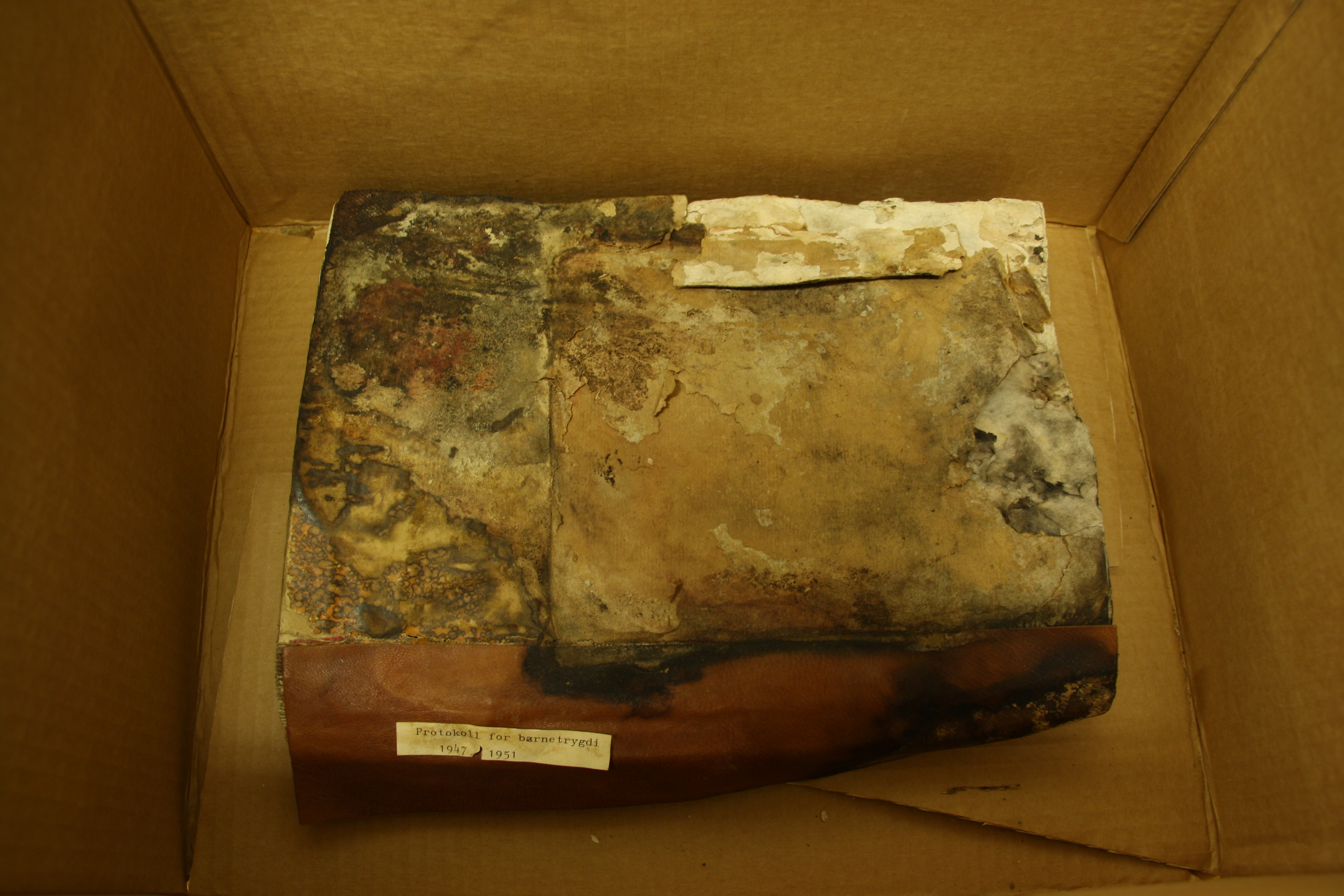 Muggsoppskadet protokoll